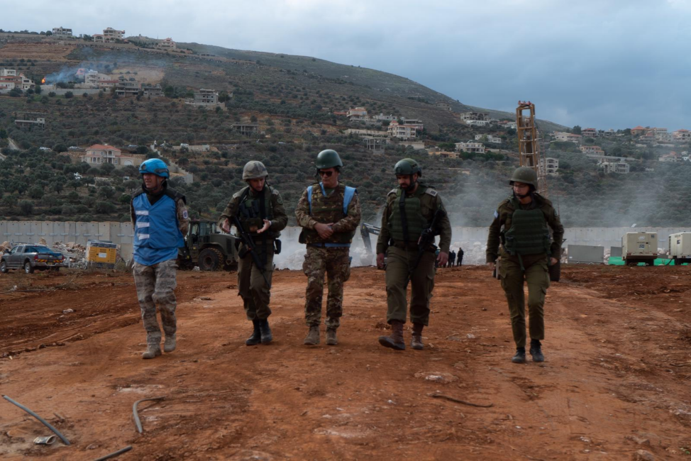 פעילות קש"ח בפרויקט "אבן משתלבת" בגבול לבנון